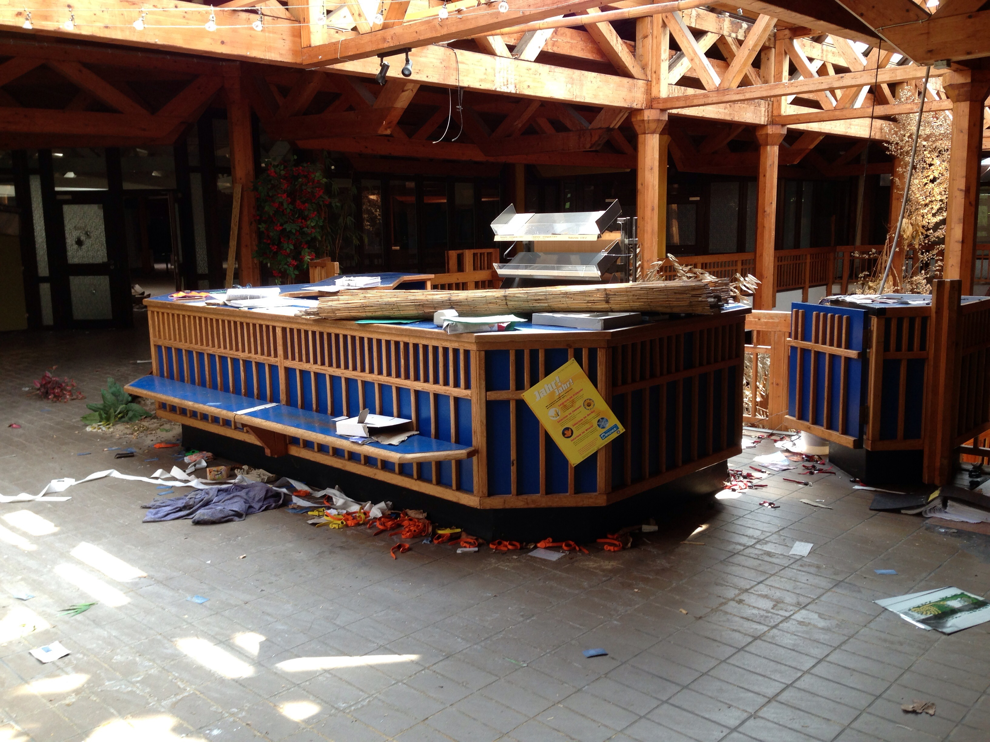 Berliner Luft- und Badeparadies im Jahr 2013